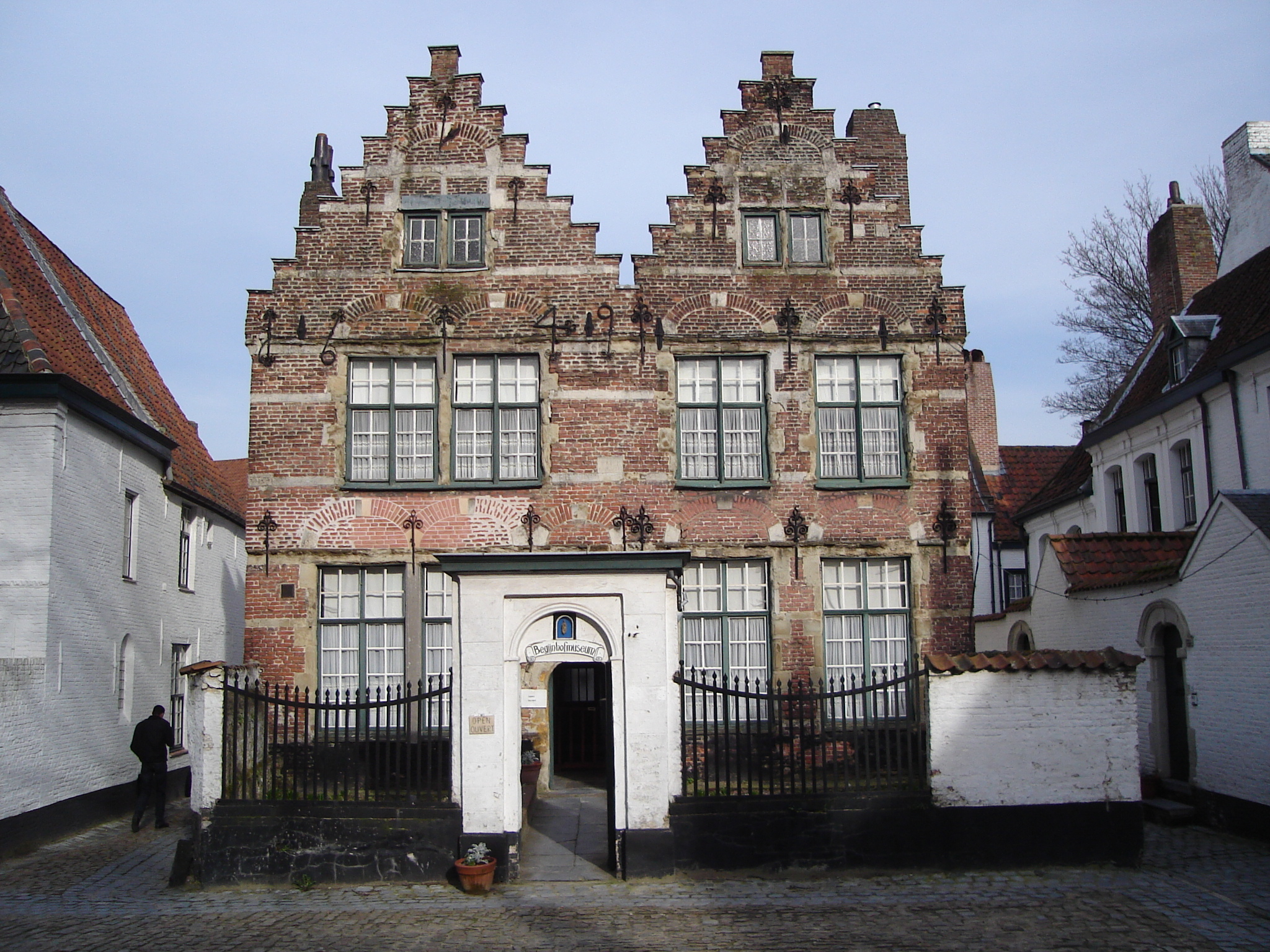 House of the Grande Dame (Huis van de Grootjuffrouw), Béguinage (beguine convent), Kortrijk.